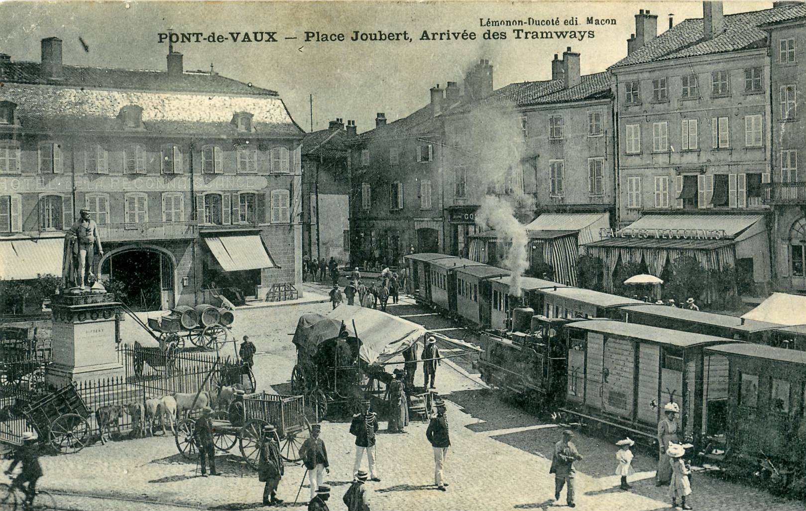 Carte postale ancienne éditée par Lémonon-Ducoté à MaconPont-DE-VAUX : Place Joubert, arrivée des Tramways